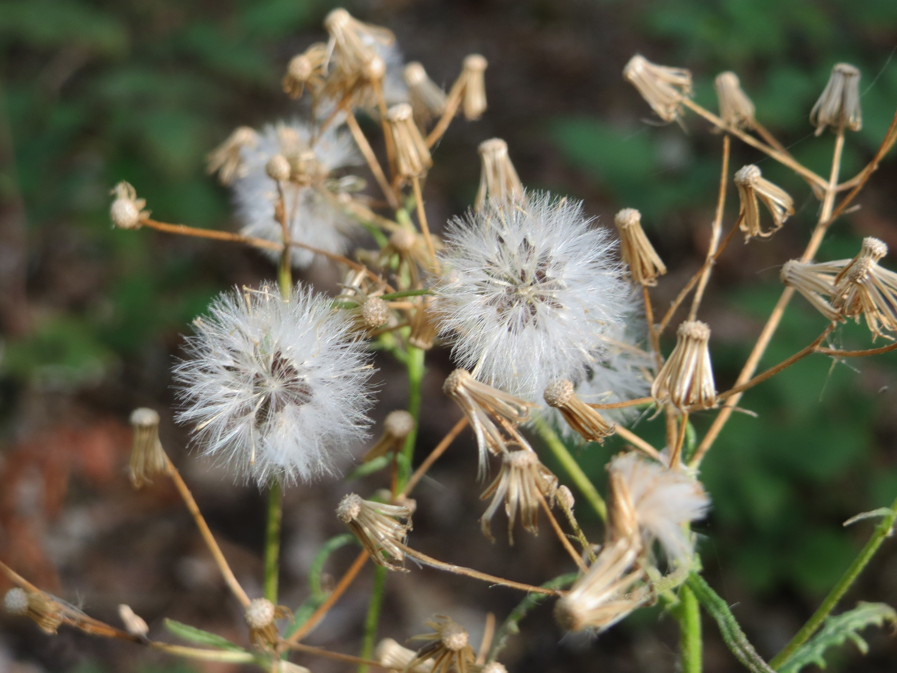 Wald-Greiskraut (Senecio sylvaticus) im Schwetzinger Hardt